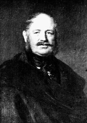 Erwein I., Fürst von der Leyen, Graf zu Hohengeroldseck (1798–1879), badischer Standesherr, bayerischer Gutsbesitzer und Generalmajor